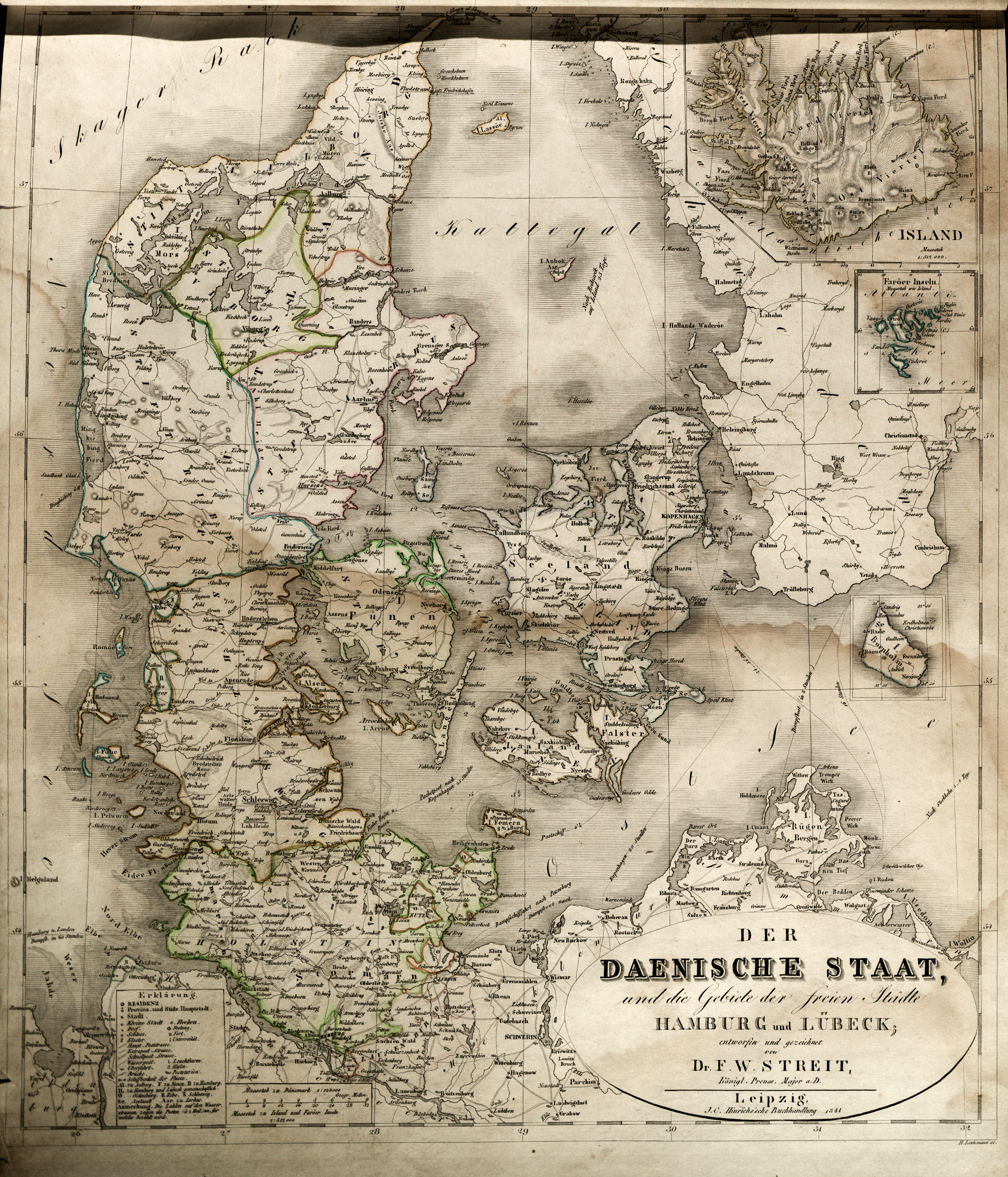 Der Daenische Staat, und die Gebiete der freien Städte Hamburg und Lübeck. Grenzkolorierte Stahlstichkarte von Friedrich Wilhelm Streit. Leipzig, Hinrich, 1838. 47 x 39 cm. (Blattgröße 51 x 43 cm). Maßstab 1:128000.- Titelkartusche unten rechts, umlaufende Gradskala, Meilenzeiger, Legende und drei Inset-Karten: Island, Faröer Inseln, Bornholm.